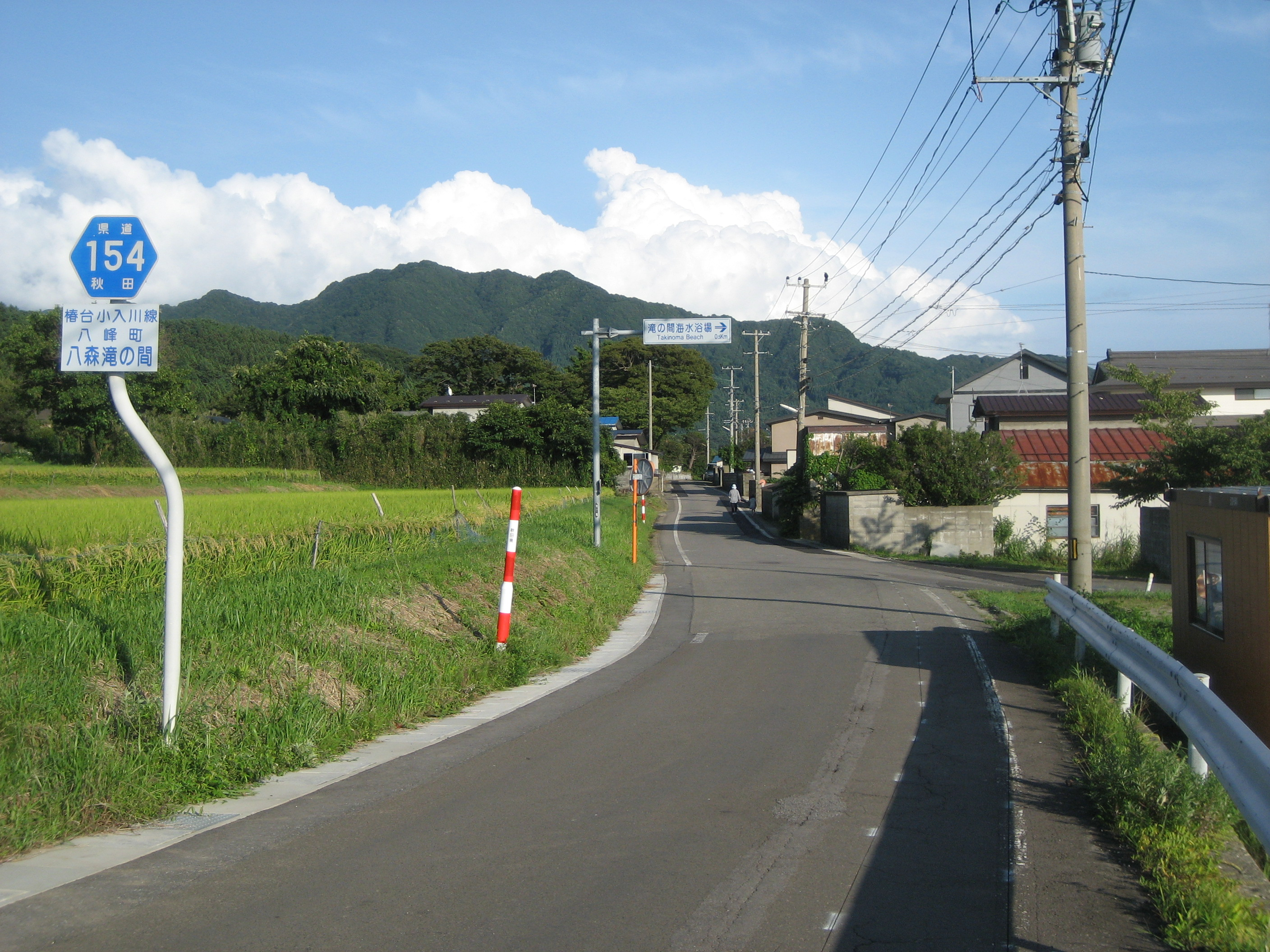 秋田県道154号線八峰町八森滝の間付近